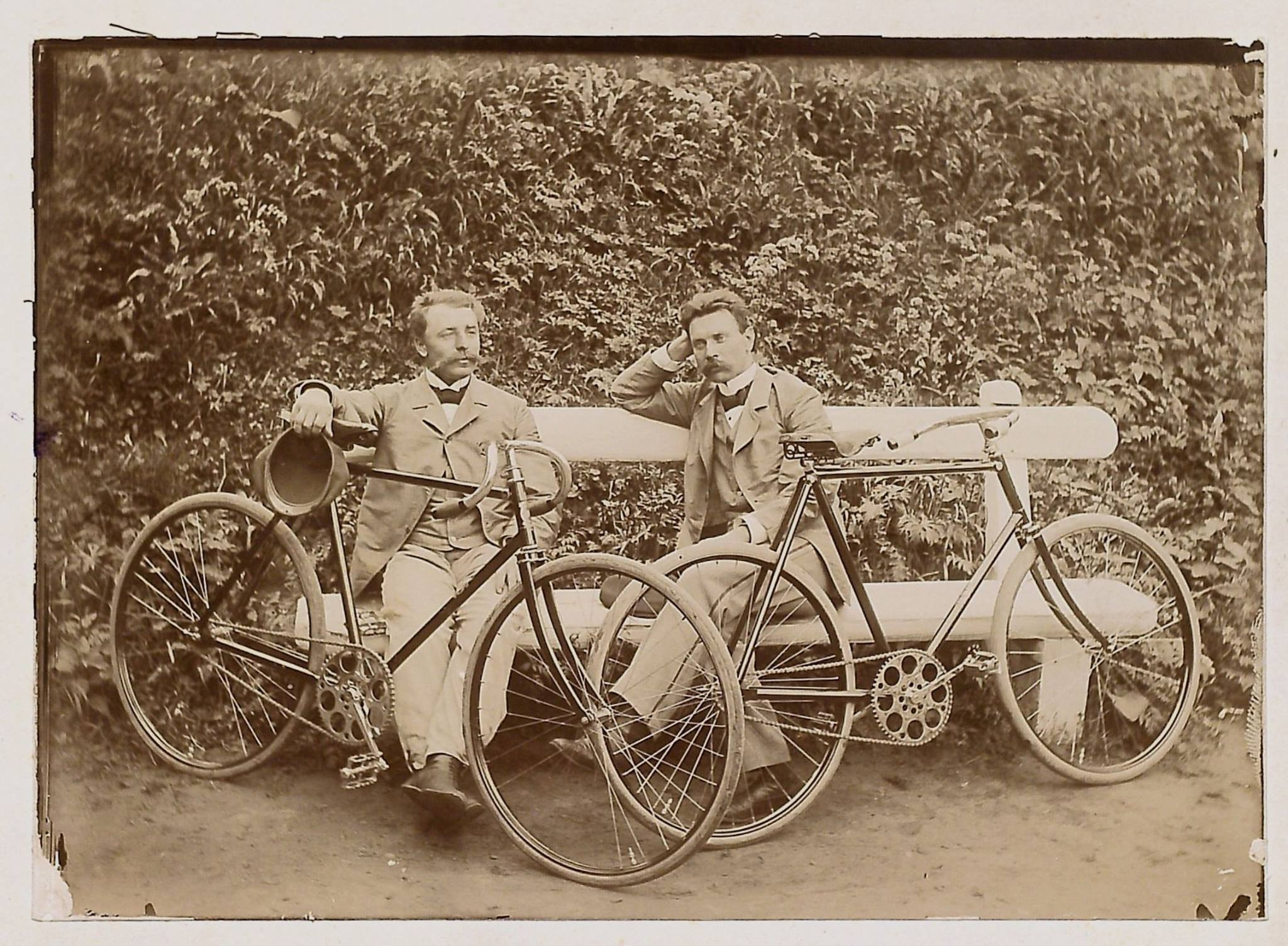 Адзін з кіраўнікоў Беларускай грамады ў Варшаве, архітэктар Лявон Дубейкаўскі (1869–1940, сядзіць справа) з сябрам падчас адпачынку ад паездкі на ровары. Фота 1914 г. З фондаў БДАМЛМ